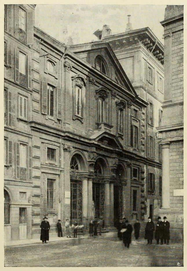 La chiesa di San Giovanni Decollato alle Case Rotte prima della sua demolizione avvenuta nel 1906